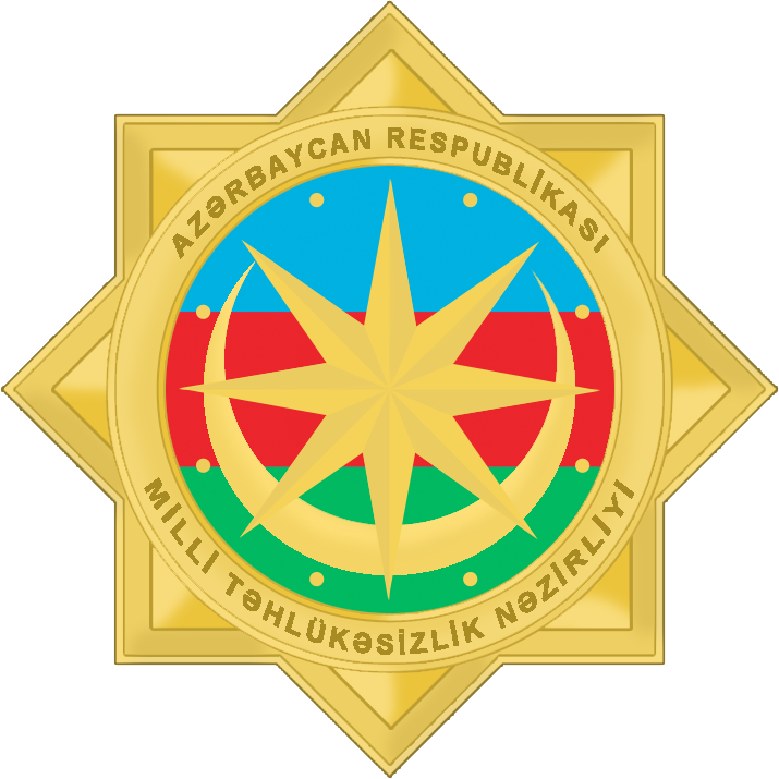 Эмблема Министерства национальной безопасности Азербайджана